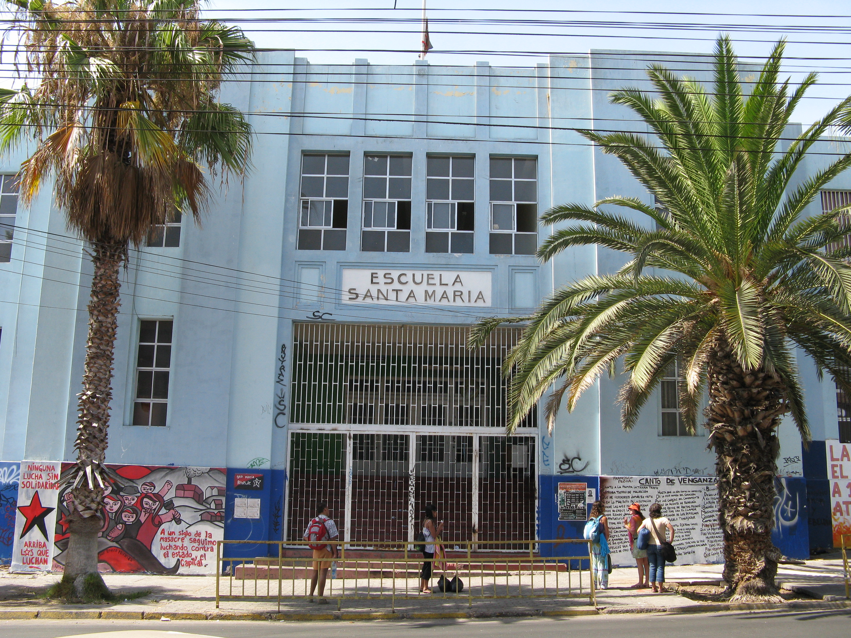 "Escuela Domingo Santa María" de Iquique, Chile.